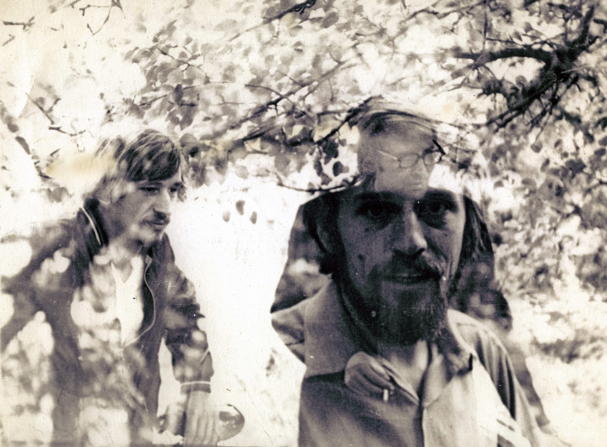 Сергей Горюнов, Владимир Мотрич, Владимир Иванов (крупным планом). Харьков, 1975.